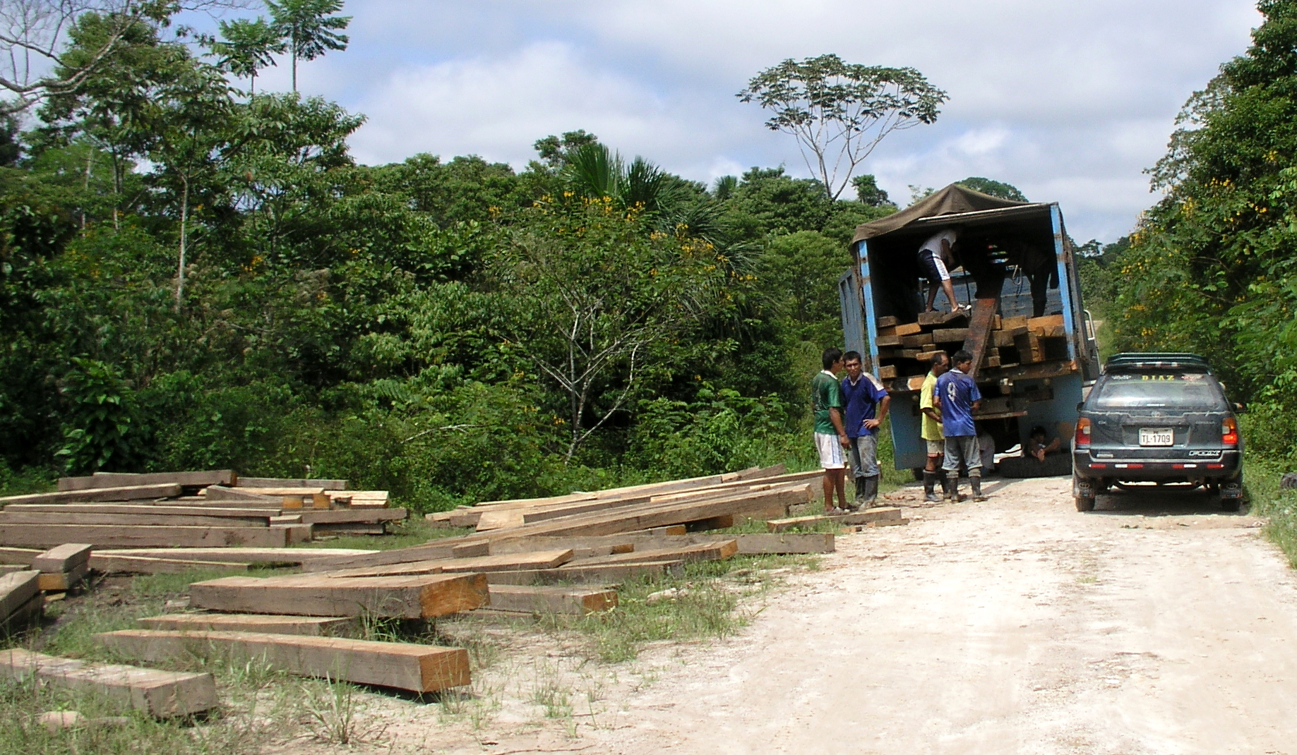 Maderos cerca Puente Nieva (Condorcanqui, Amazonas, Peru).